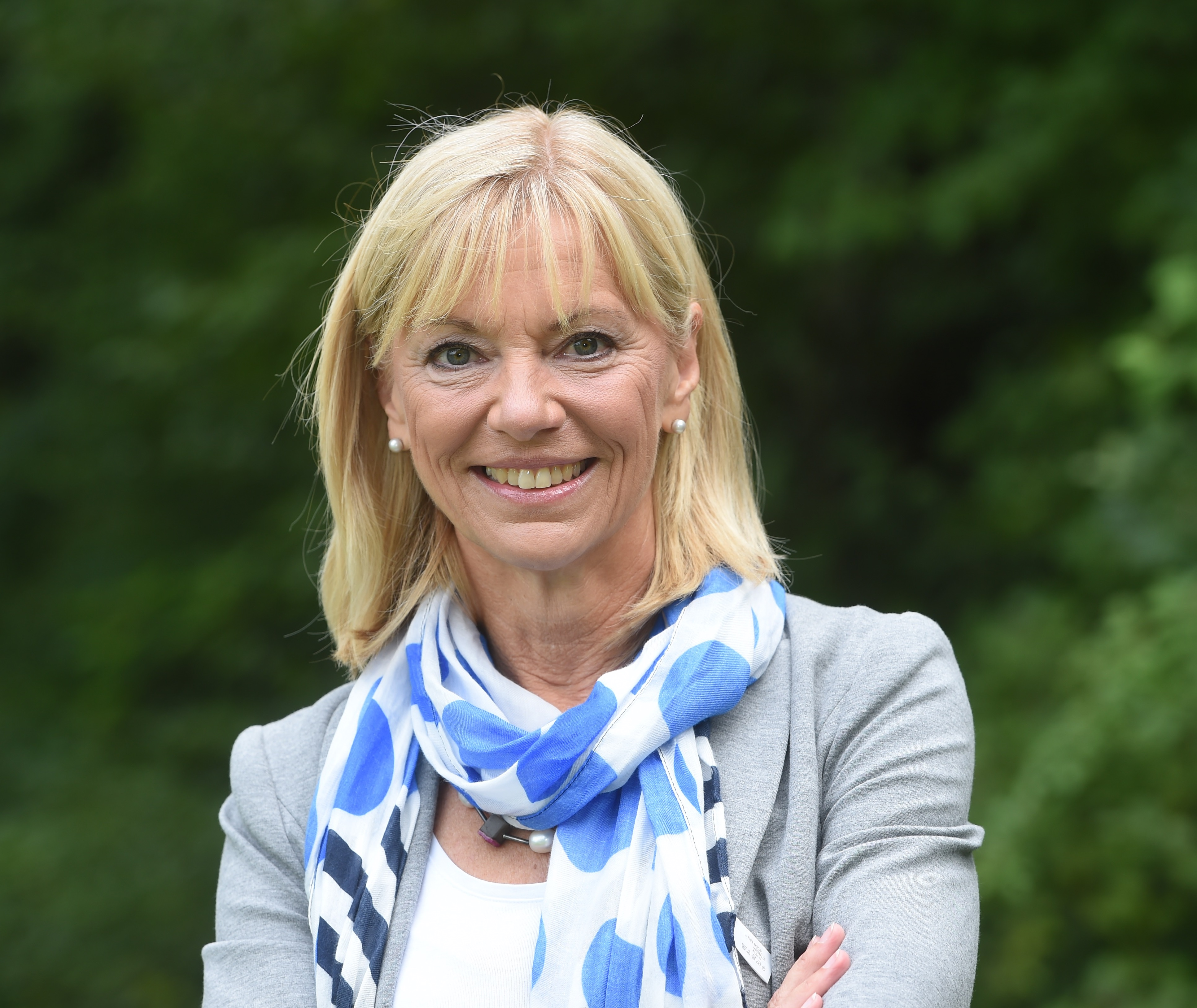 Portrait v. Marcus Merk